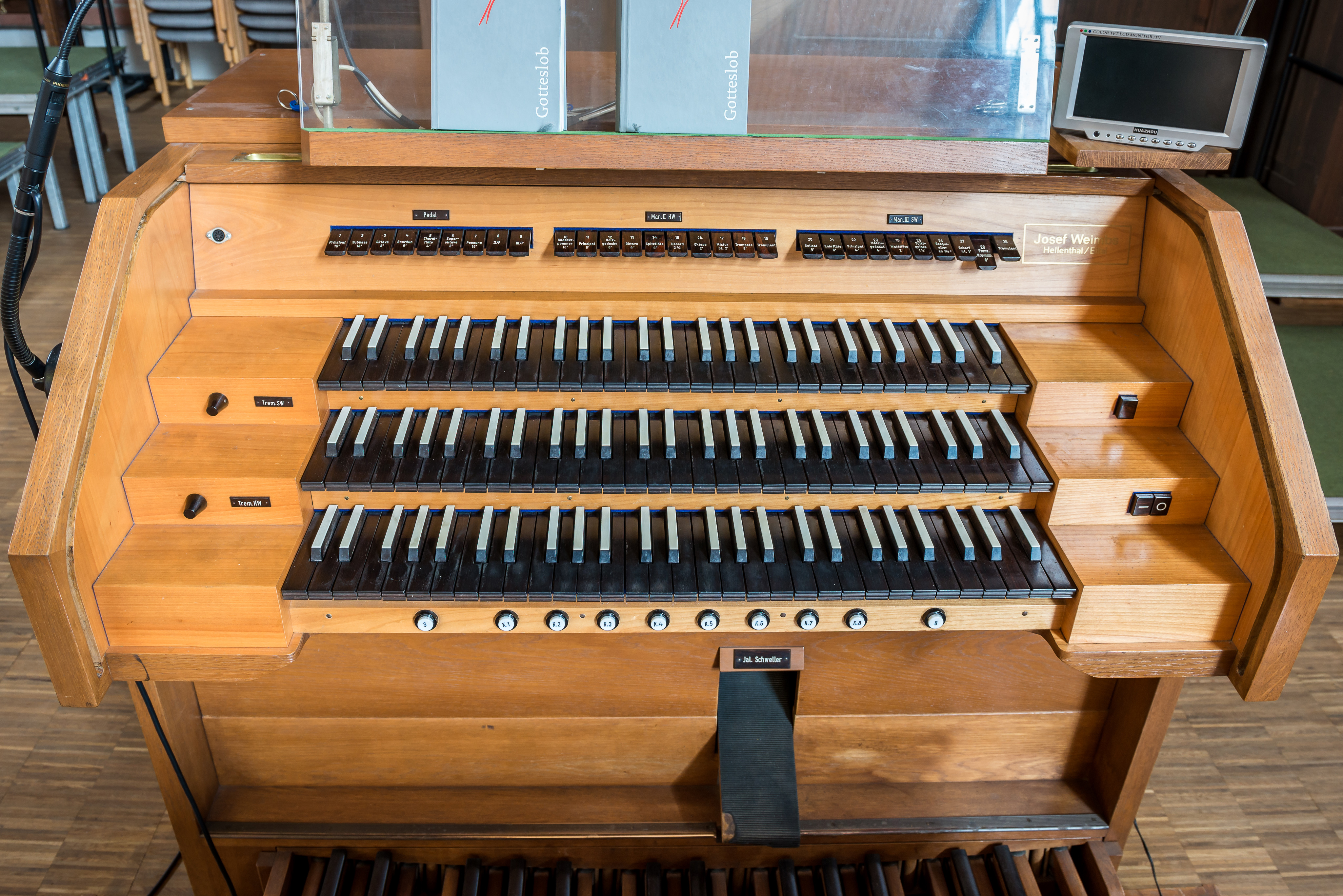 Spieltisch der Weimbs Orgel von St. Michael in Düsseldorf-Lierenfeld